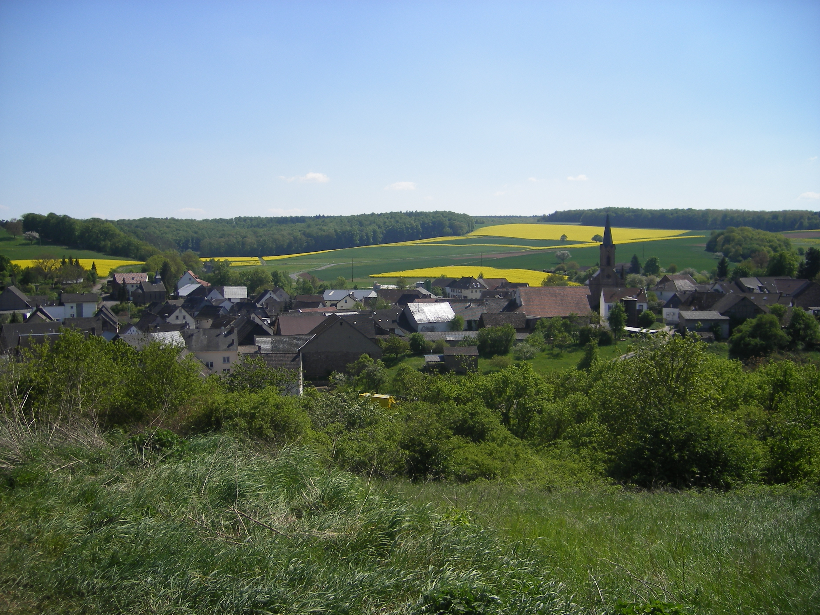 Limbach bei Kirn, Rhineland-Palatinate